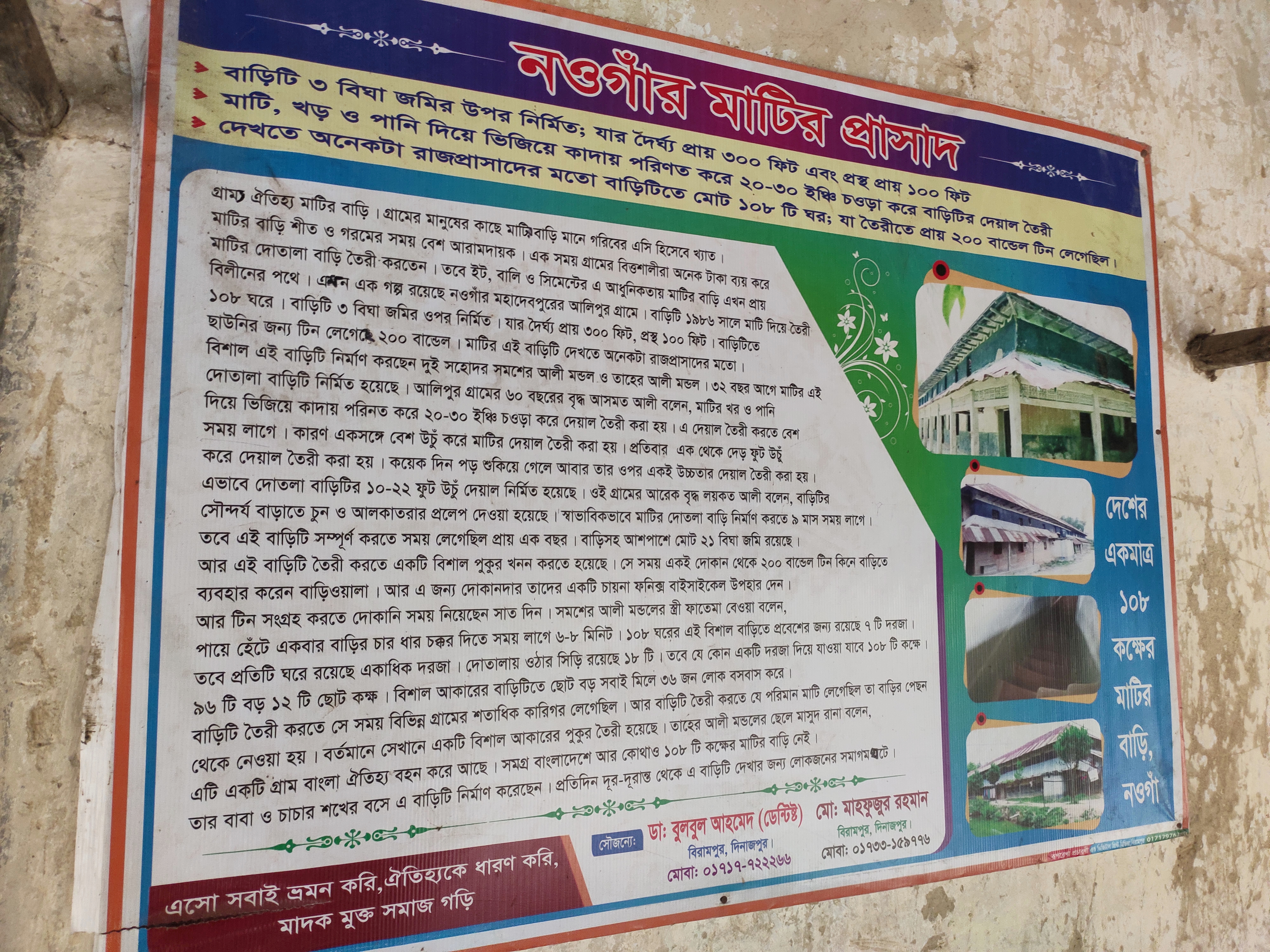 ১০৮ কক্ষবিশিষ্ট মাটির প্রসাদ। এটি নওগাঁ জেলায় অবস্থিত।